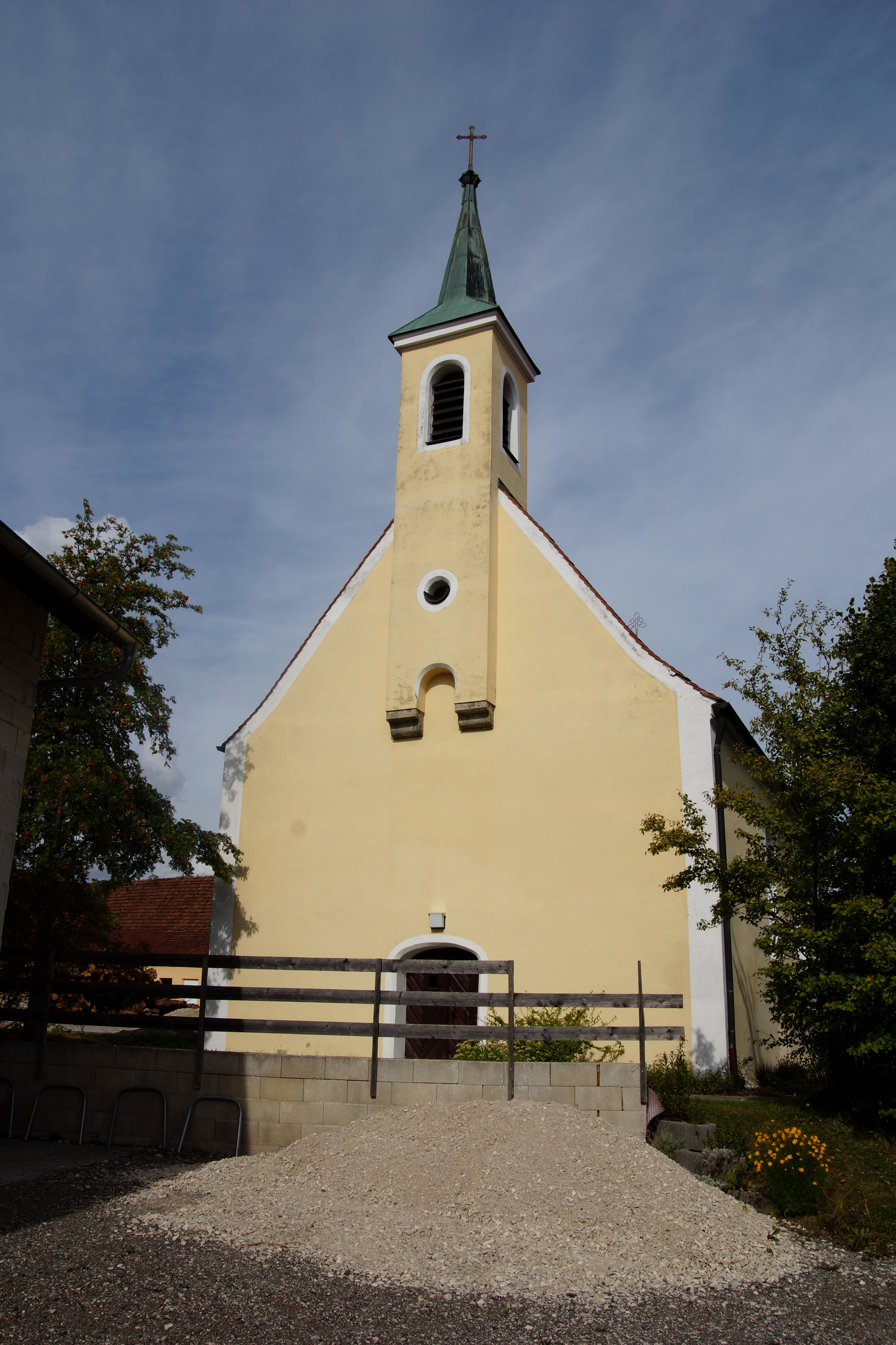 Die katholische Filialkirche St. Ägidius in Raitenbuch in der Oberpfalz